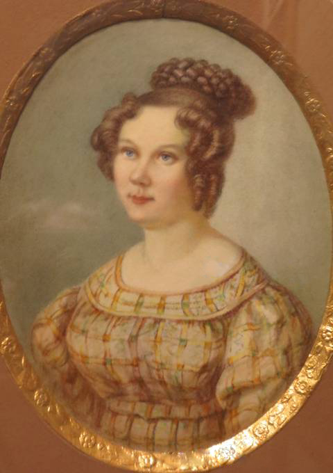 Екатерина Ивановна Трубецкая (1800-1854) ур. Лаваль. Жена декабриста С.П.Трубецкого